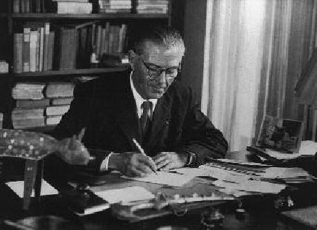 Henri Bosco écrivant